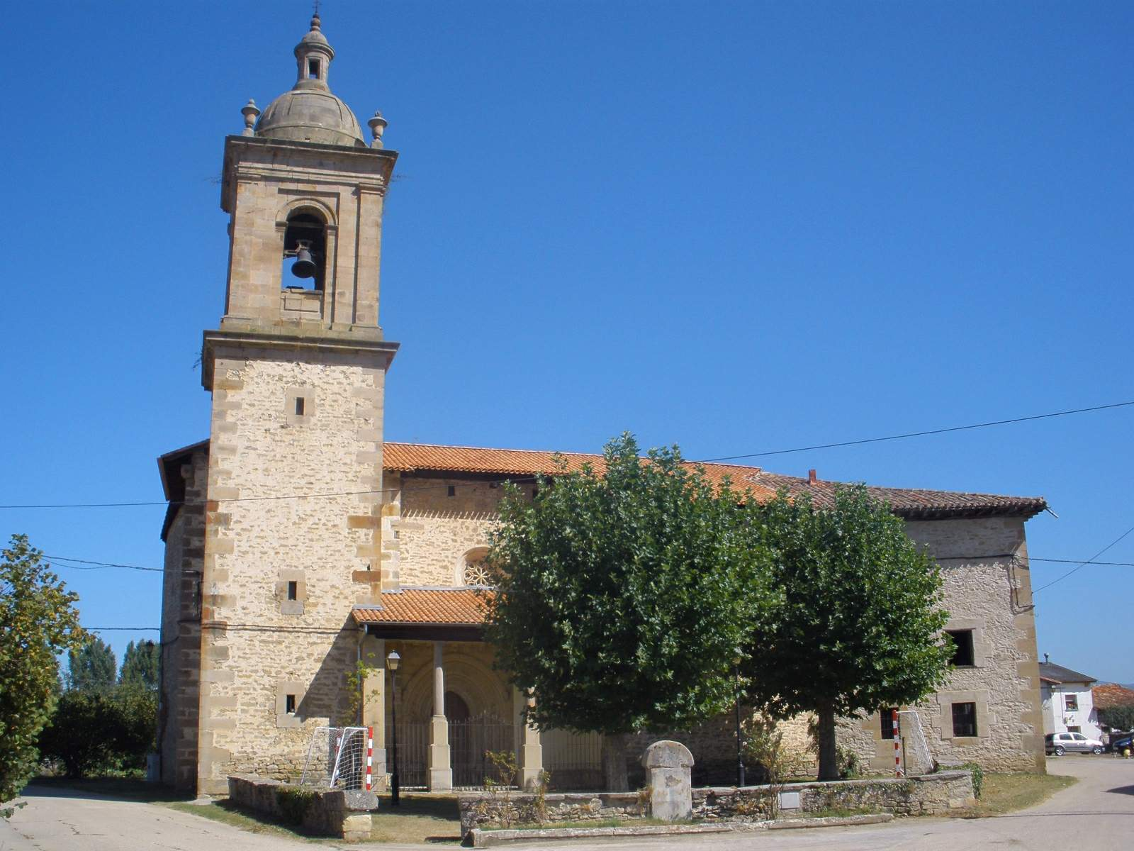 Matauco (Alava) - Iglesia de San Pedro Apostol